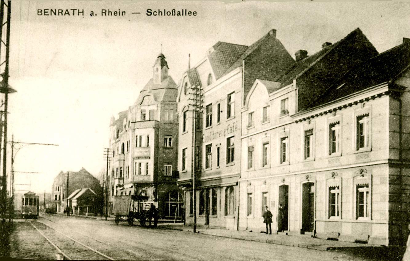 Benrath a. Rhein - Schloßallee, Postkarte, nach 1909. Blick nach Westen. Elektrischer Straßenbahn-Triebwagen der Überlandstrecke auf der Linie Oberbilk-Benrath (Benrather Netz). Rechts hinter der Strasseneinmündung neubarockes Wohnhaus (1903-1904, Architekt Carl Tuchscherer), heutige Nr. 16 der Sophienstrasse, 1983 in die Denkmalliste der Landeshauptstadt Düsseldorf eingetragen [1].